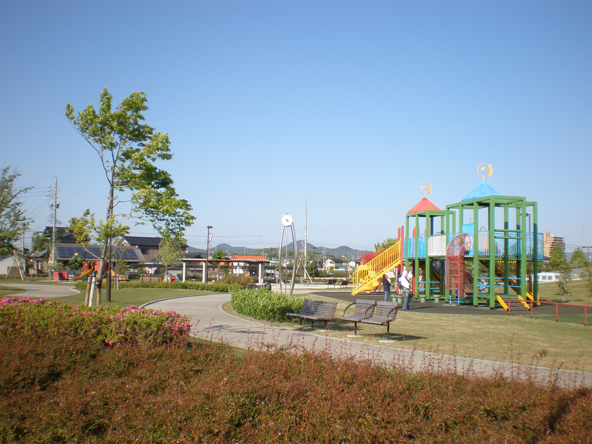 愛知県小牧市にある小牧市スポーツ公園